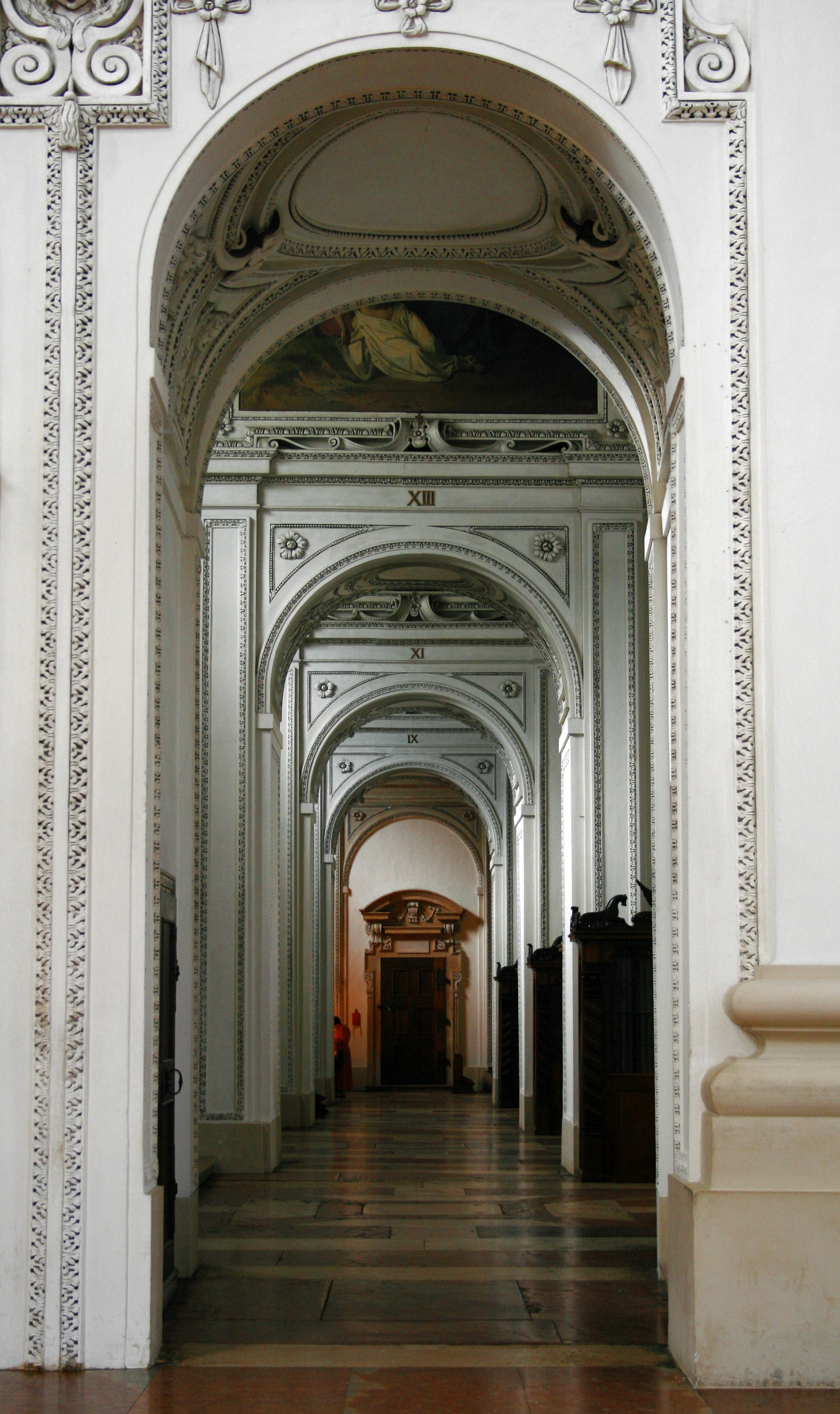 Salzburger Dom